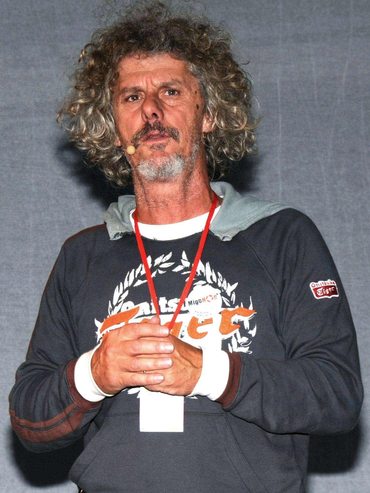 Paolo Migone al Festival della Creatività 2008